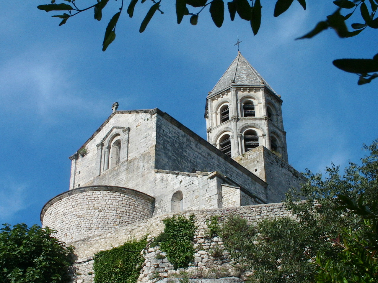 Eglise Saint-Michel de La Garde-Adhémar (FR-26) vue côté jardin botanique